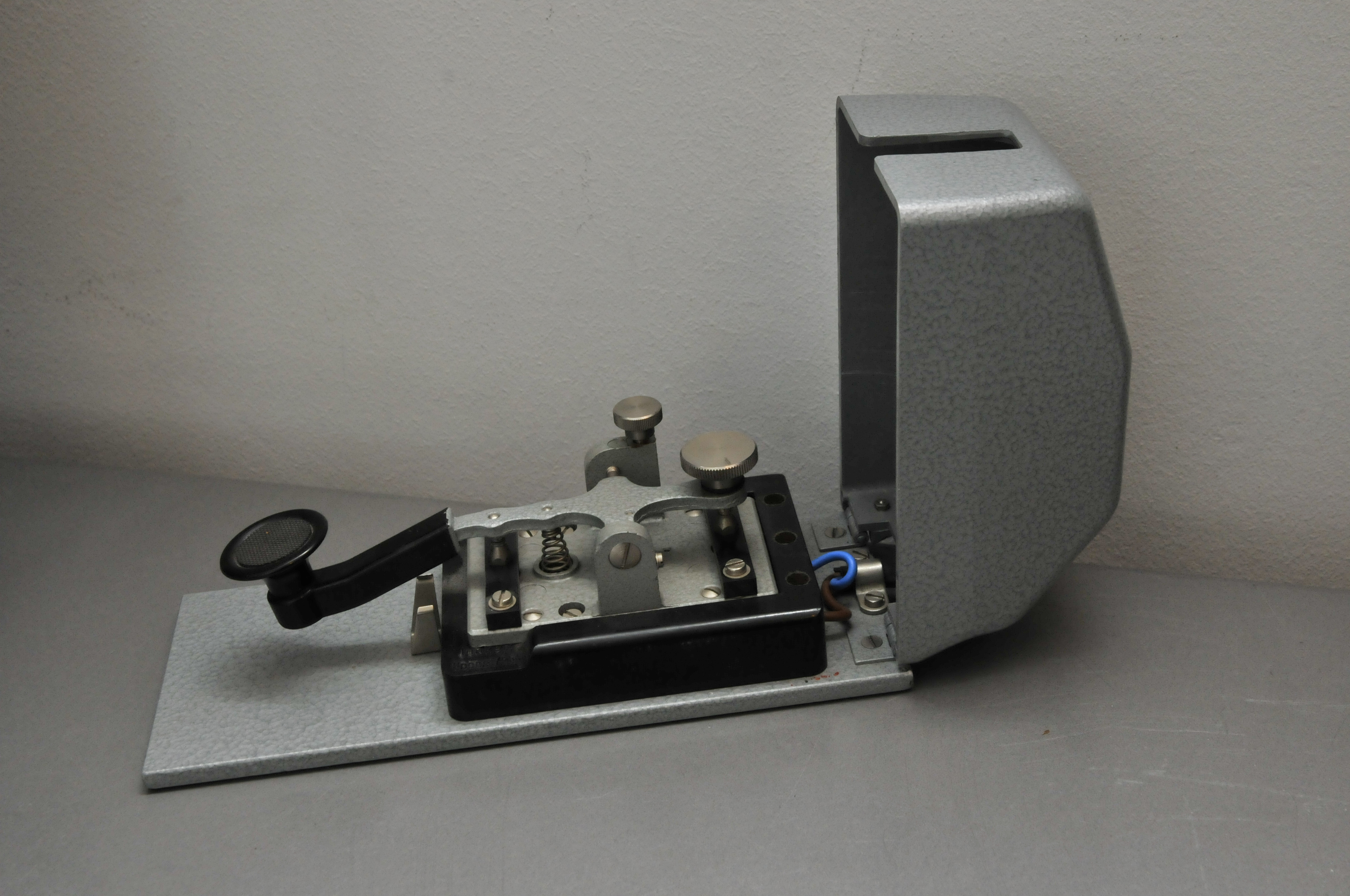 Junker Morsetaste M.T. , Bad Honnef, zivile Version, letzte Variante